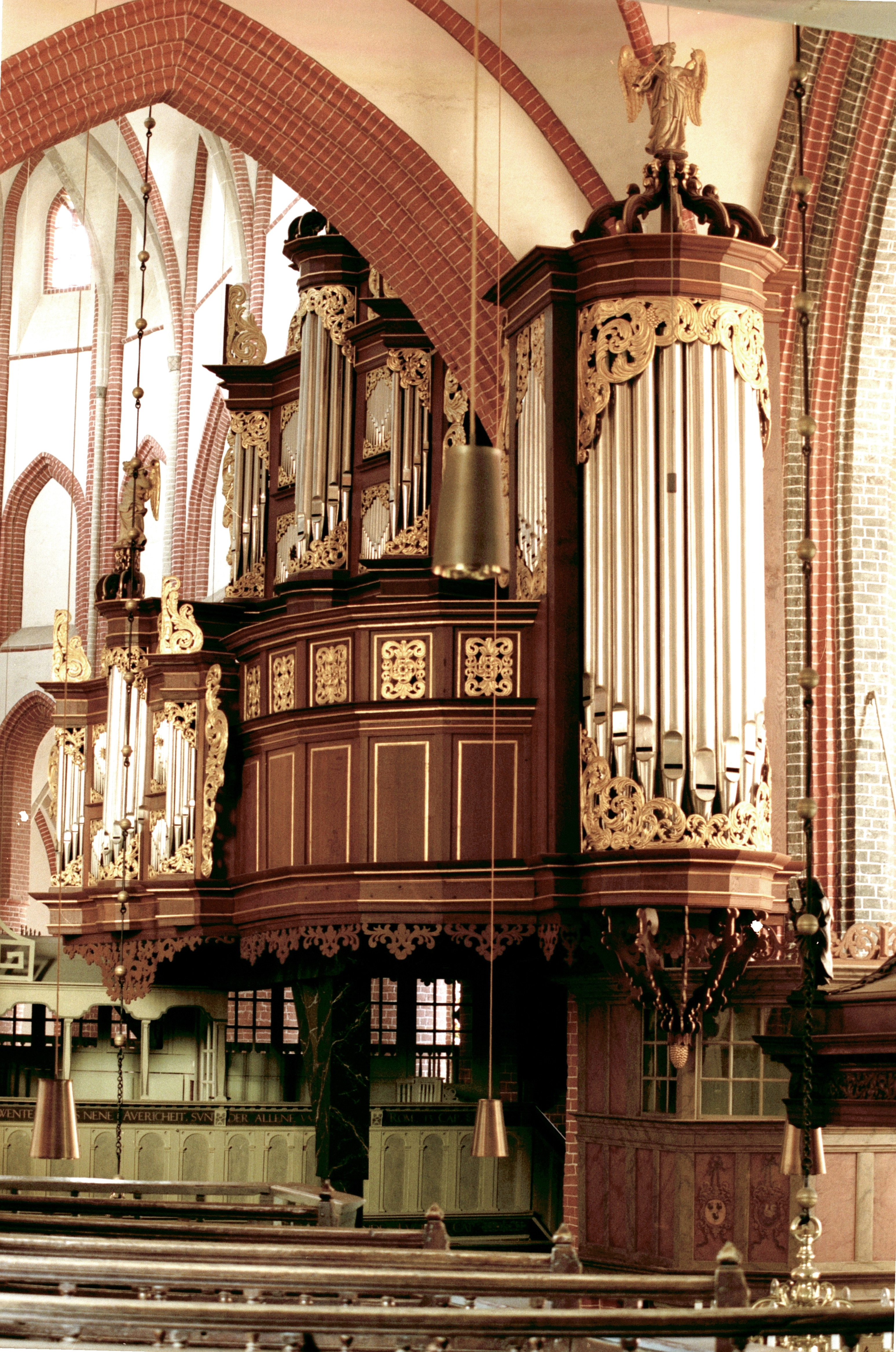 Schnitger-Orgel vom Langschiff aus gesehen, links das Rückpositiv, in der Mitte oben das Hauptwerk, rechts der Pedalturm